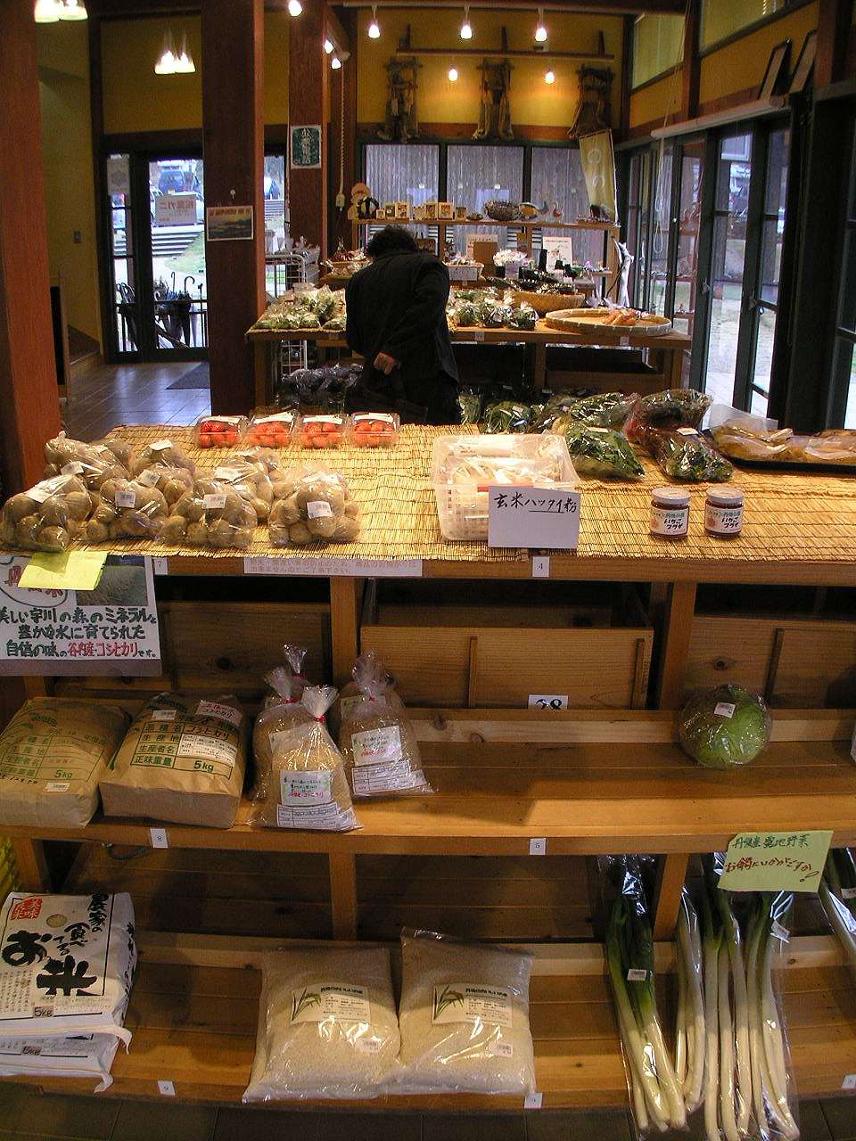 宇川温泉よし野の里・農産物直売所